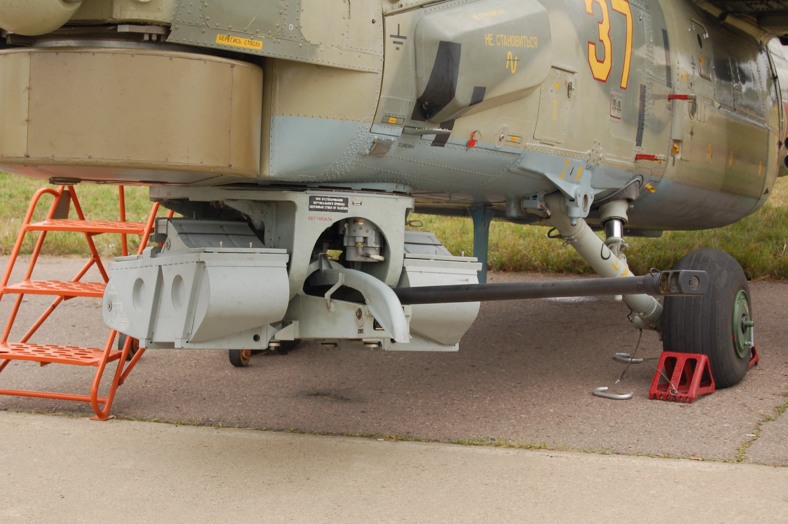 30-мм автоматическая пушка 2А42 в носовой турельной установке на Ми-28Н. Макс-2009